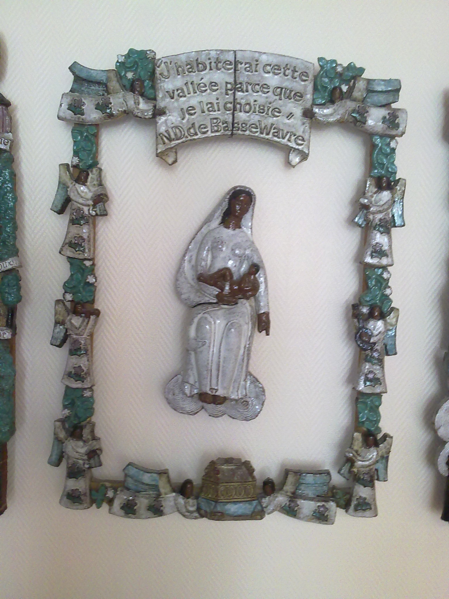 Céramique ND de Basse Wavre de l'artiste Max Van der Linden (1922-1999) aux Cliniques St Pierre d'Ottignies.